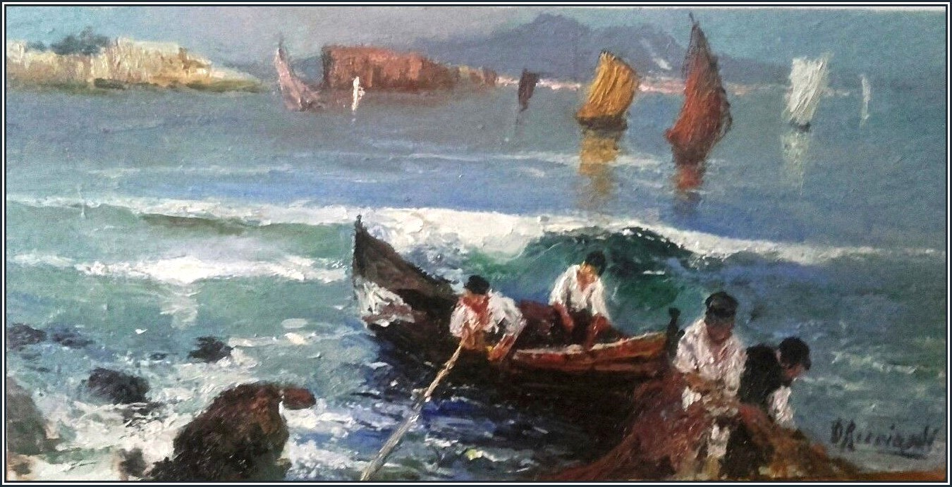 Оскар Риччарди, "Неаполитанские рыбаки", масло, панель, около 1900 года.